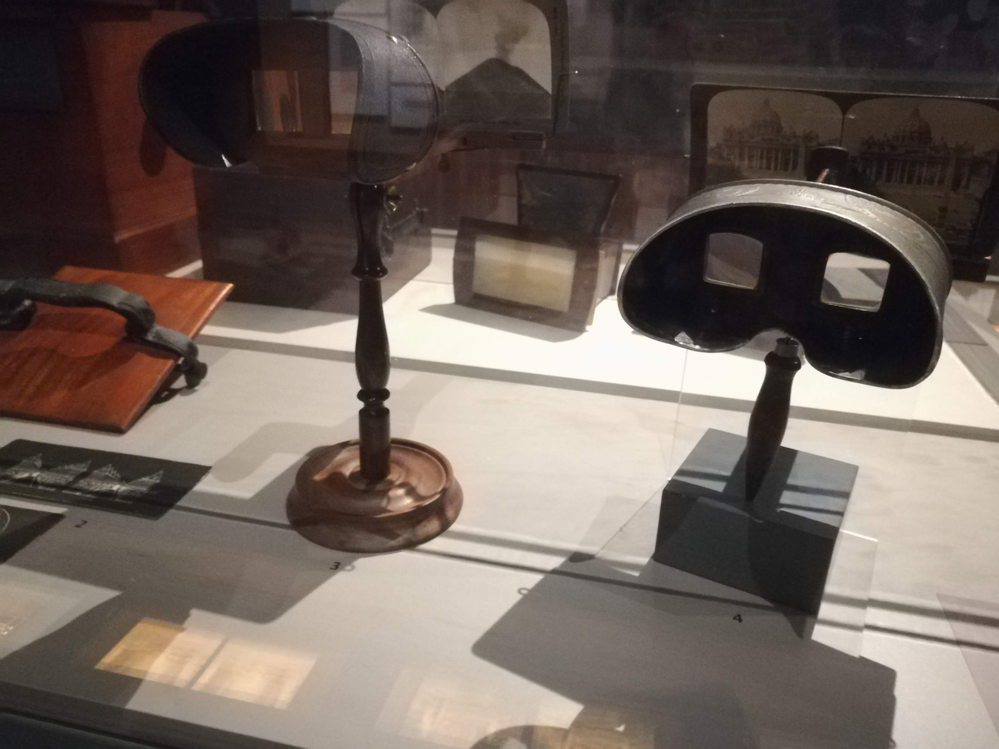 Ulleres utilitzades per les vistes òptiques